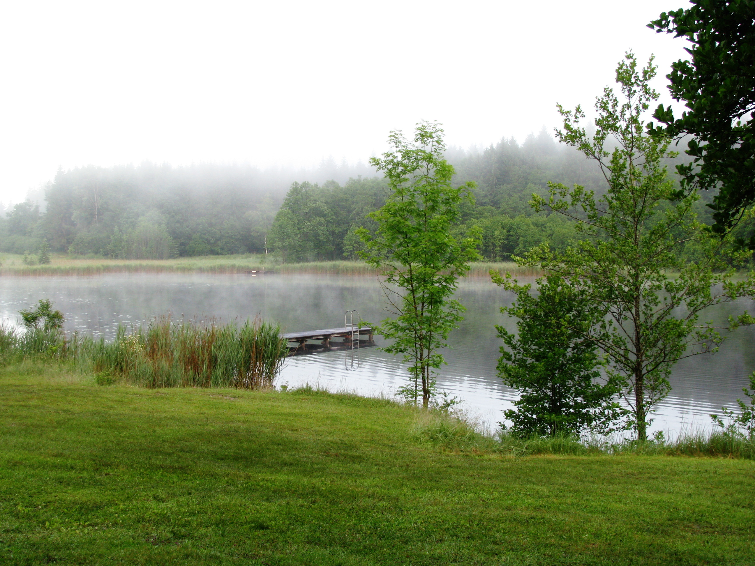 Eitzenberger Weiher, Alter Weiher mit dem Badegelände.